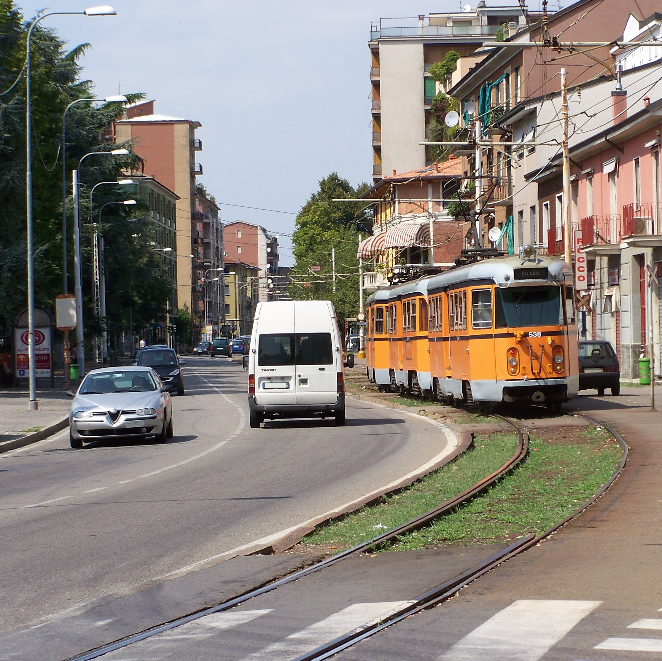 Un Bloccato Gruppo 500 (538+504+537) transita sul marciatram di via Vittorio Veneto a Bresso poco prima dell'ingresso della fermata di Bresso Raddoppio.